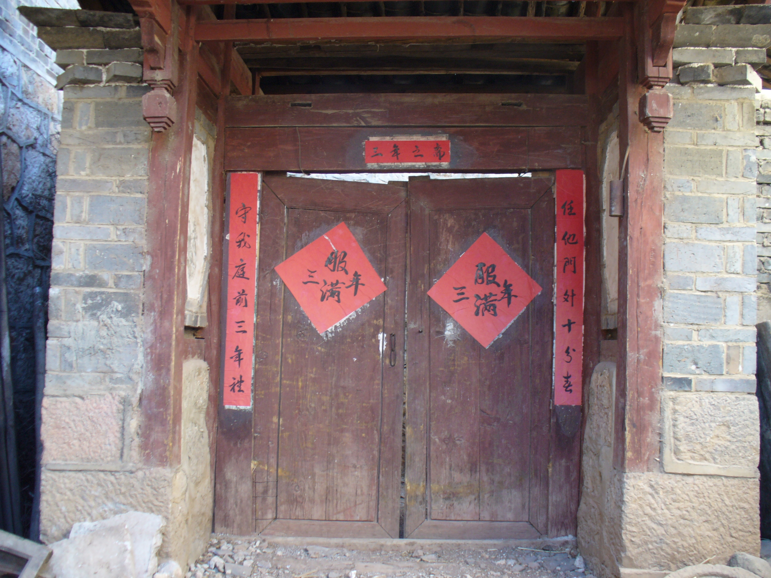 Rotes Duilian aus Lijiang, 在丽江照的对联